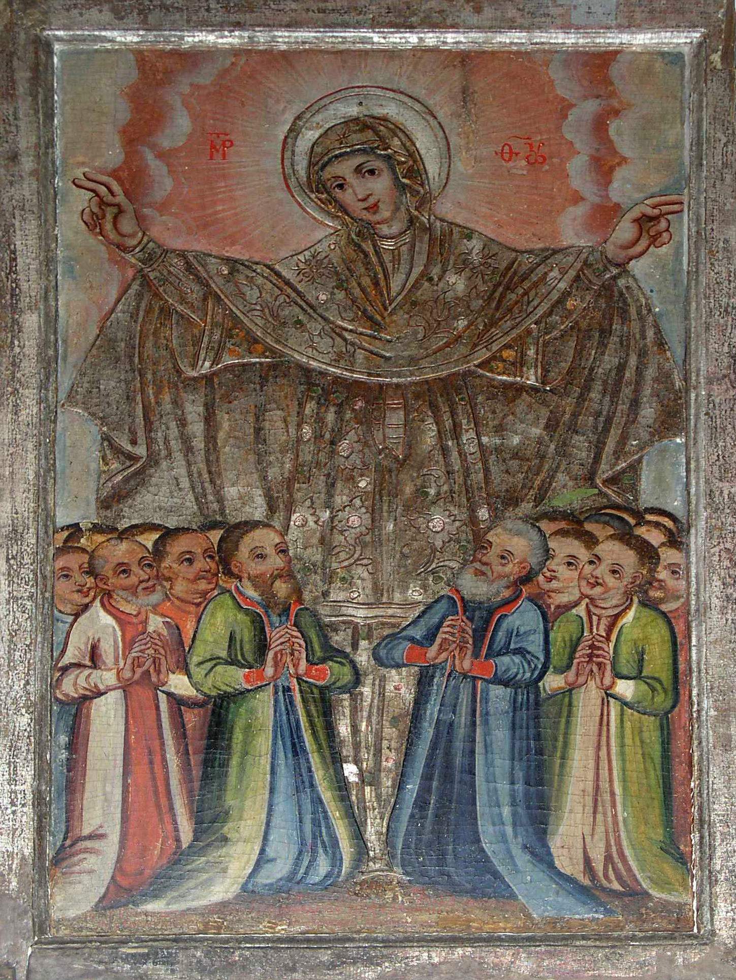 Поклоніння Волхвів 17 ст.